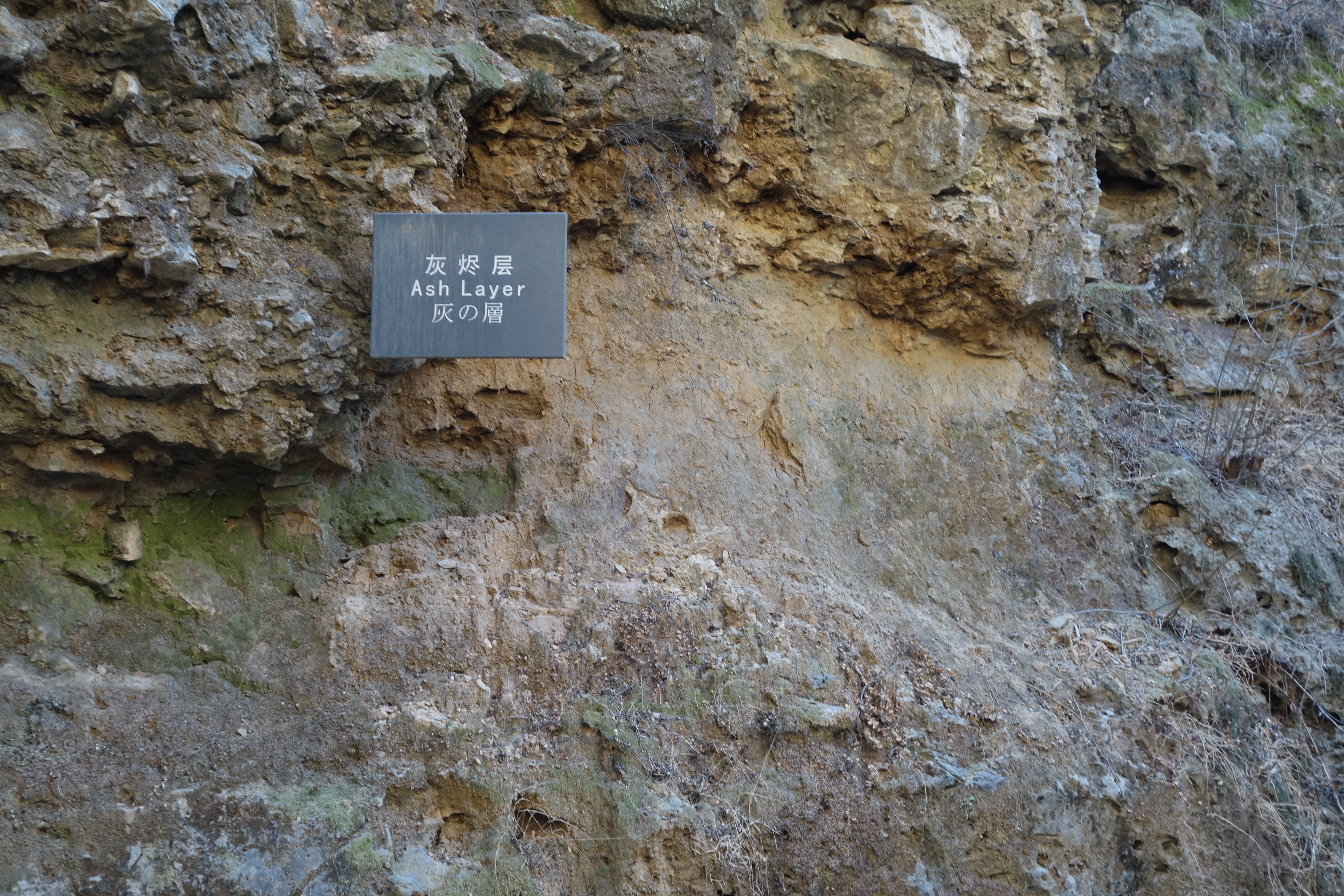 北京猿人遗址灰烬层